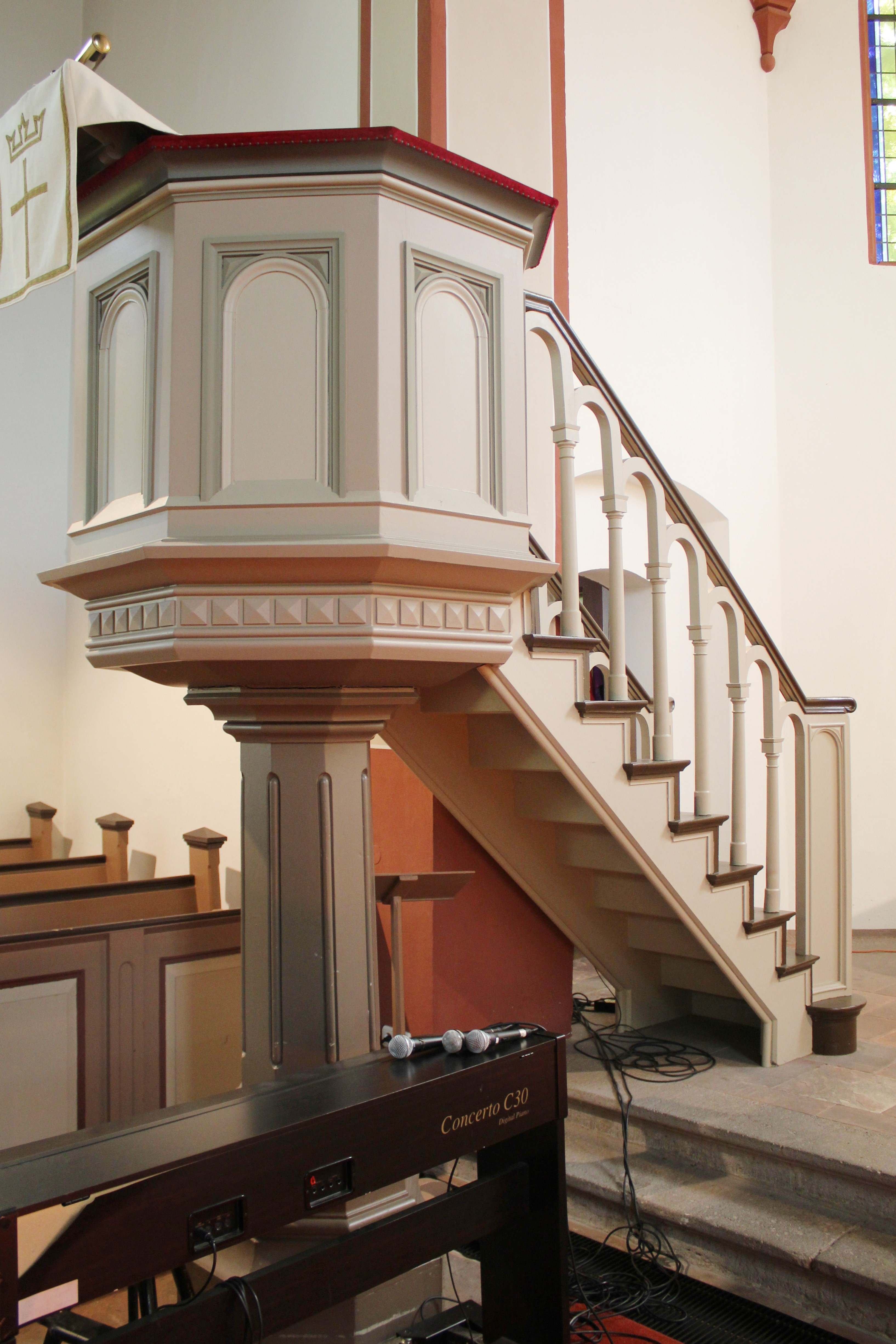 Ev. Kirche Garbenheim, Wetzlar, Lahn-Dill-Kreis, Hessen, Deutschland